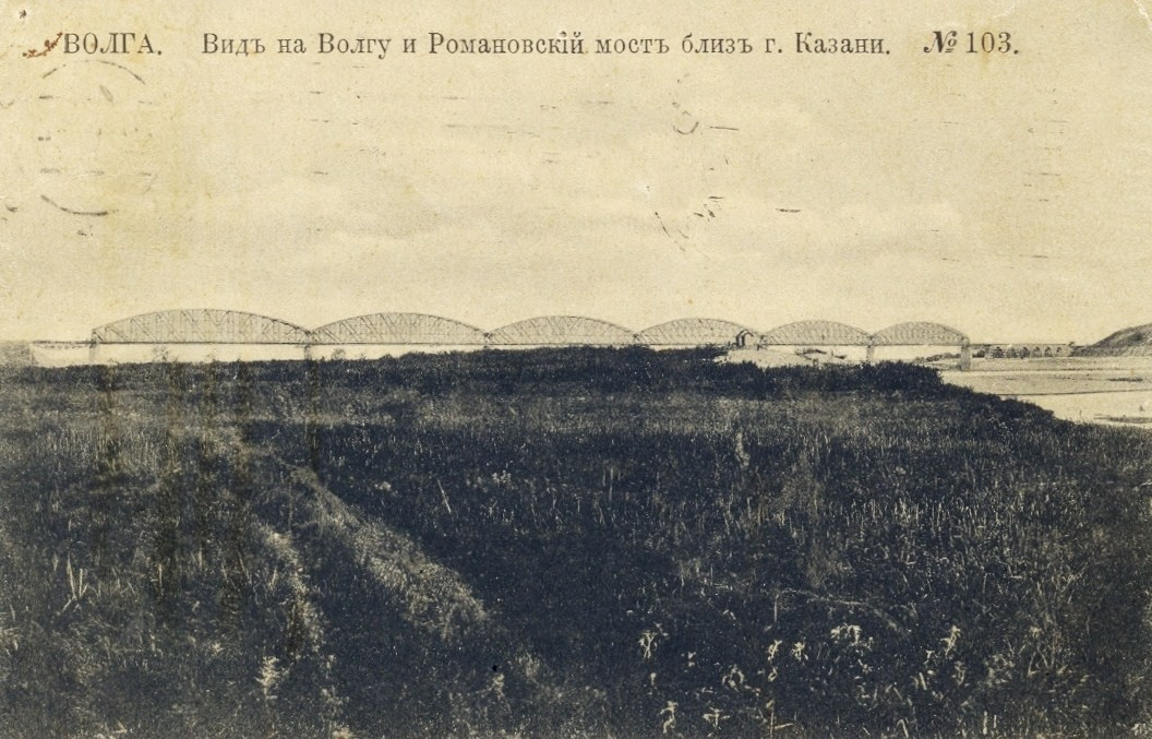 Вид на Волгу и Романовский мост. Надписи над изображением (на лицевой стороне открытки): «ВОЛГА. Видъ на Волгу и Романовскiй мостъ близъ г. Казани. № 103.». Надписи на оборотной стороне открытки: «ПОЧТОВАЯ КАРТОЧКА письмо адресъ». «№ 103. J. M. J. K. 1 7 13.»